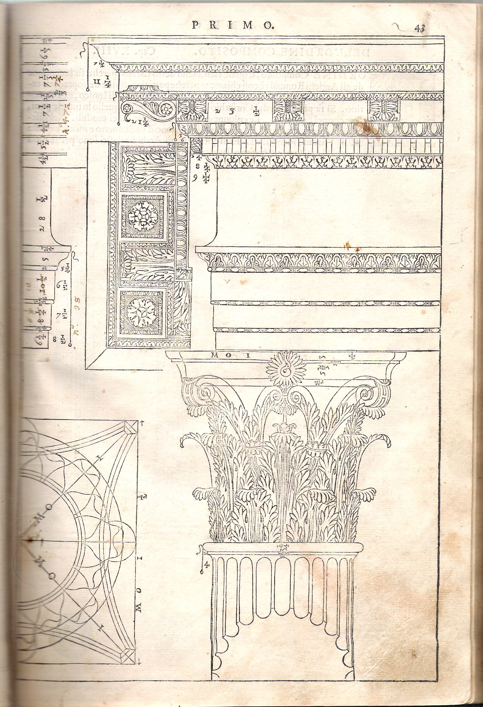 Andrea Palladio, "Quattro libri dell´architettura", prima edizione 1570 - libro I - Capitello Corinzio